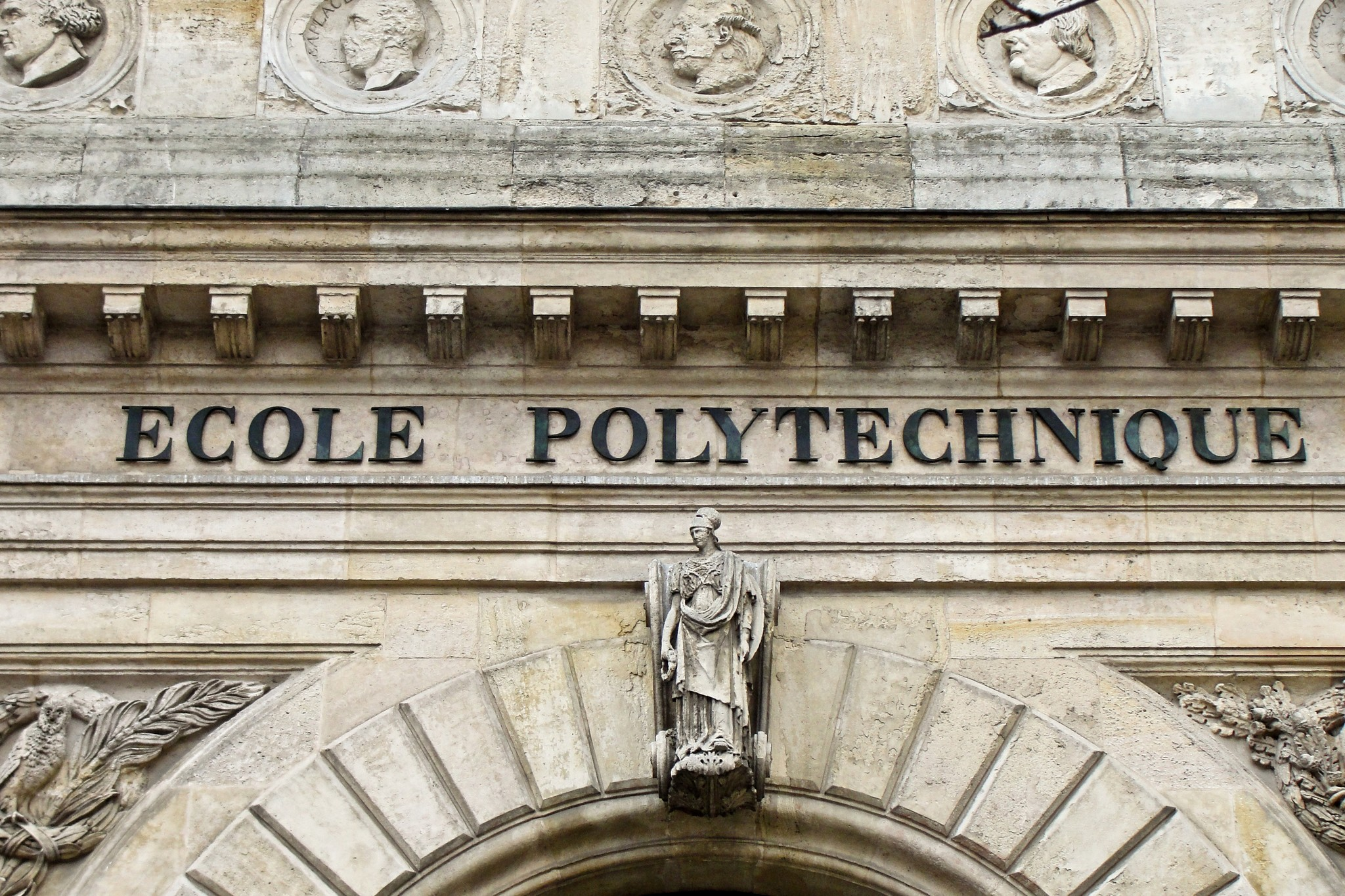 Inscription au dessus de l'entrée de l'ancienne école polytechnique, aujourd'hui Ministère de la Recherche Scientifique, rue Descartes, Paris, France.